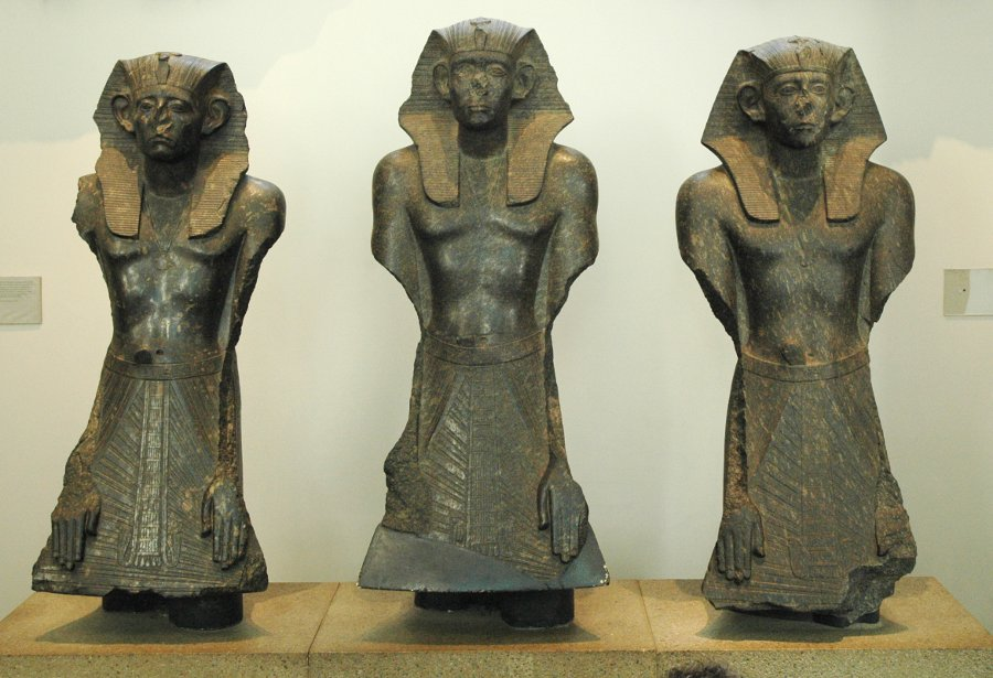 Drei schwarze Granitstatuen von Sesostris III die im Totentempel des Mentuhotep II. in Deir el-Bahari aufgestellt wurden und sich heute im British Museum in London befinden.